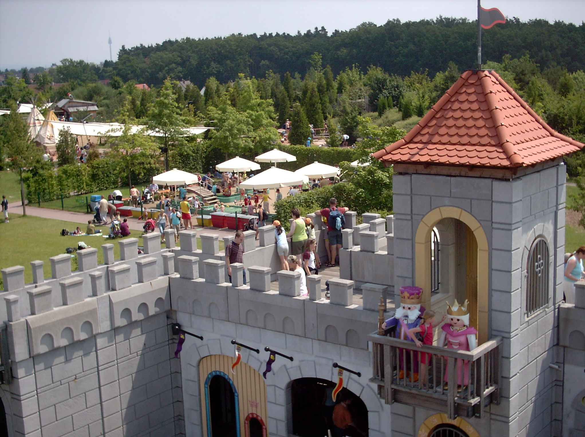 Playmobil Funpark, Ritterburg, Zirndorf/Germany